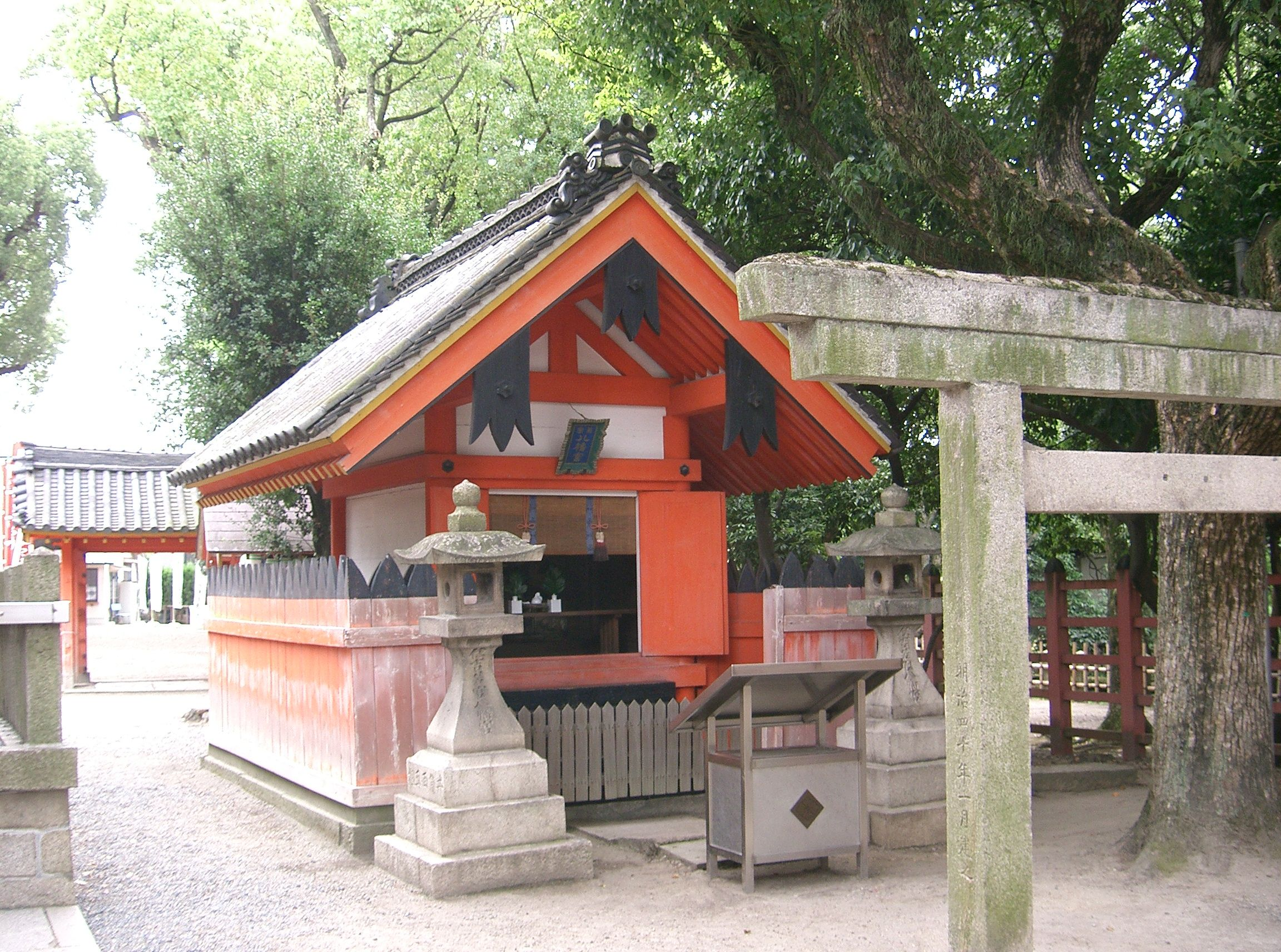 住吉大社 若宮八幡宮